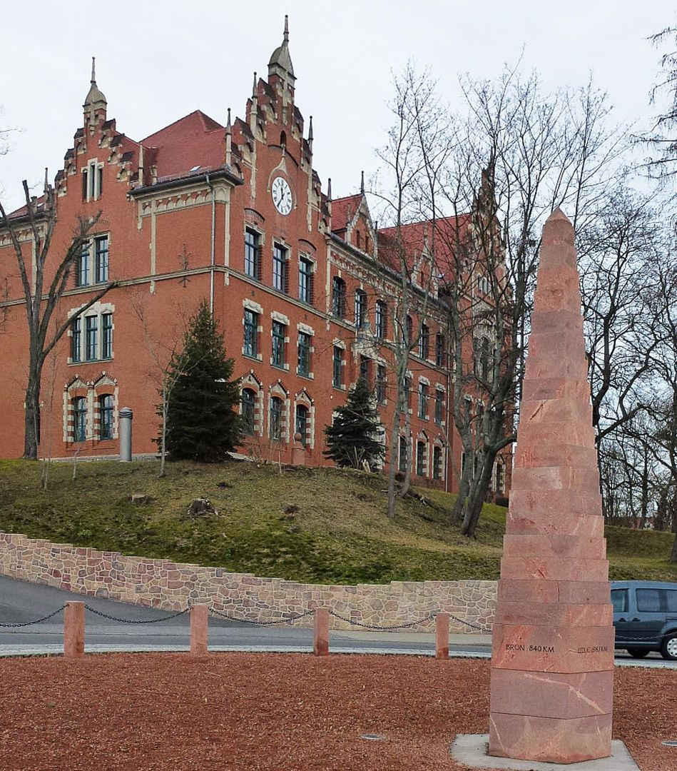 Rote Schule in Grimma, Außenstelle des BSZ